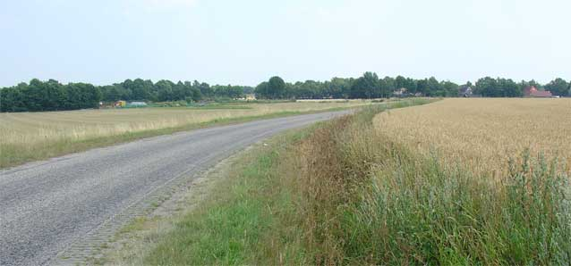 Zicht op Bronneger (gem. Borger-Odoorn)